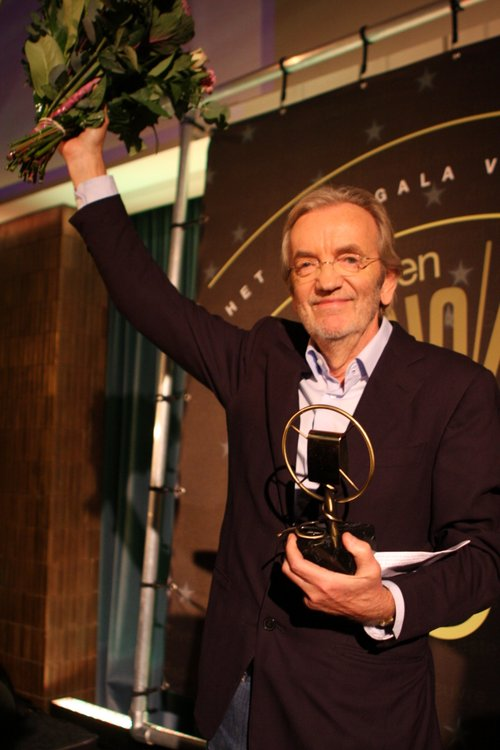 Lex Harding